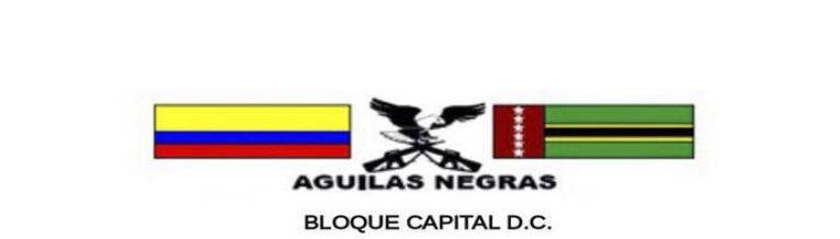 Miles de integrantes de las Autodefensas Unidas de Colombia volvieron a la reinserción, luego de un proceso de desmovilización en 2006.